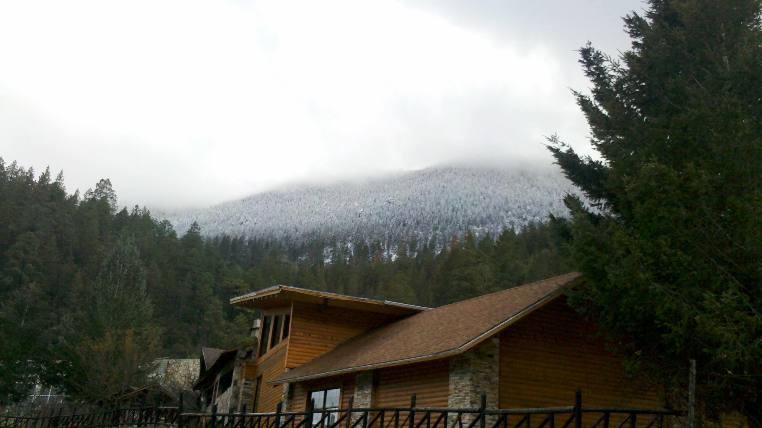 Monterreal, Artega, Coahuila.